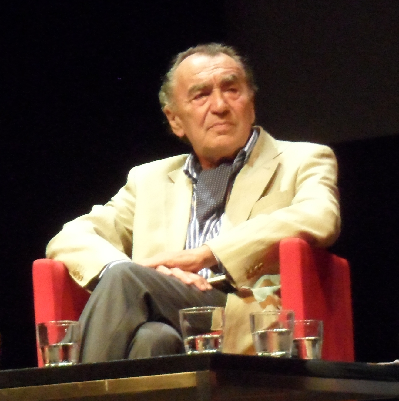 Milan Rakovac septembra 2012 v Kopru